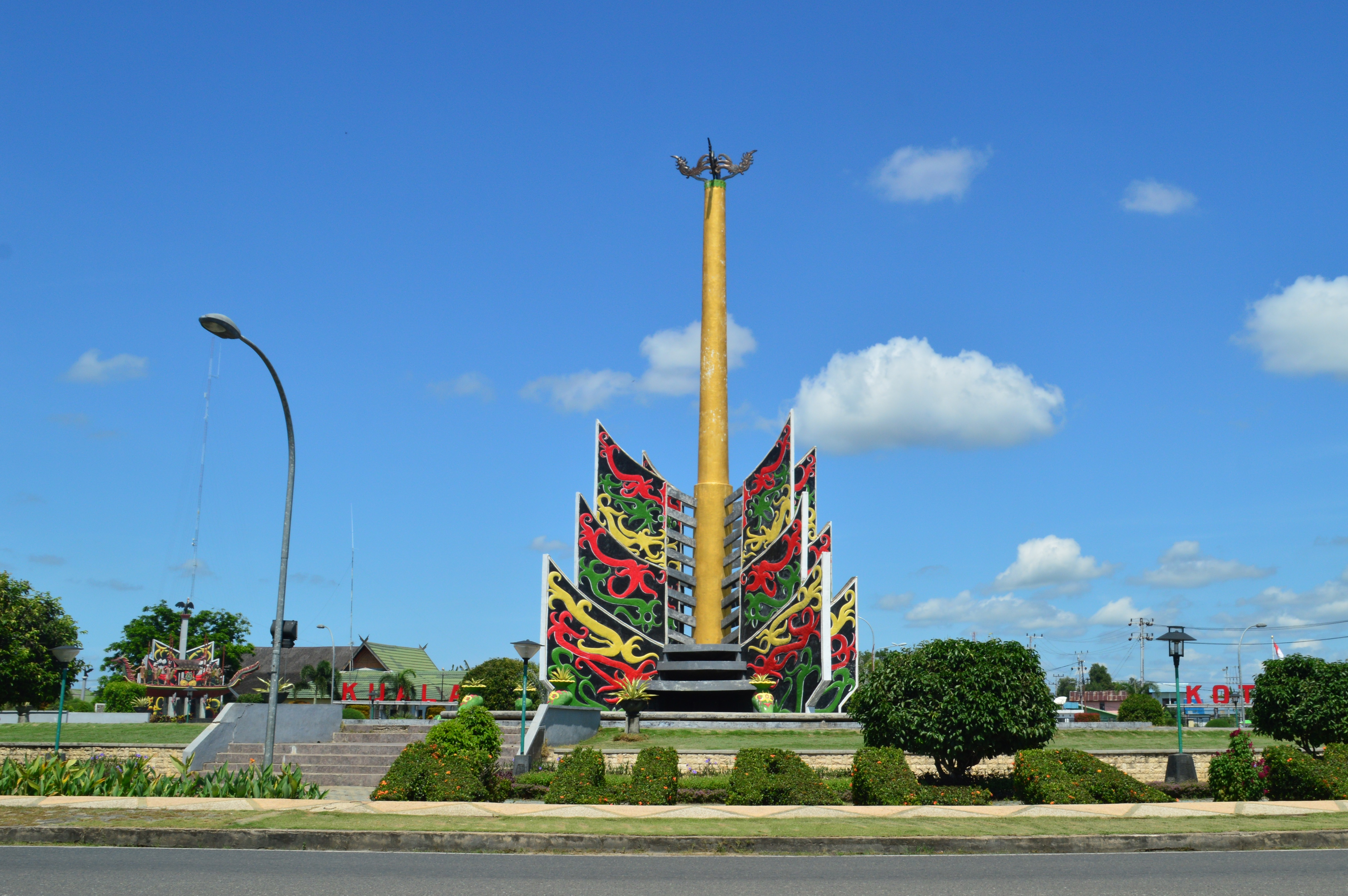 Tugu Batang Garing di kota Kuala Kapuas, Kalimantan Tengah.